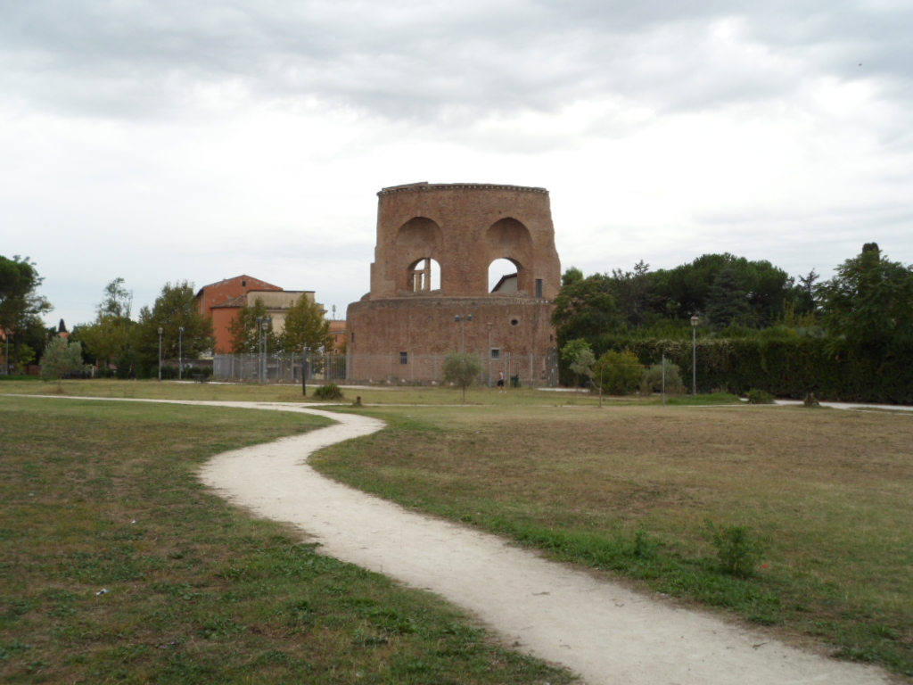 Mausoleo di Sant'Elena - Ville De Sanctis This is a photo of a monument which is part of cultural heritage of Italy.